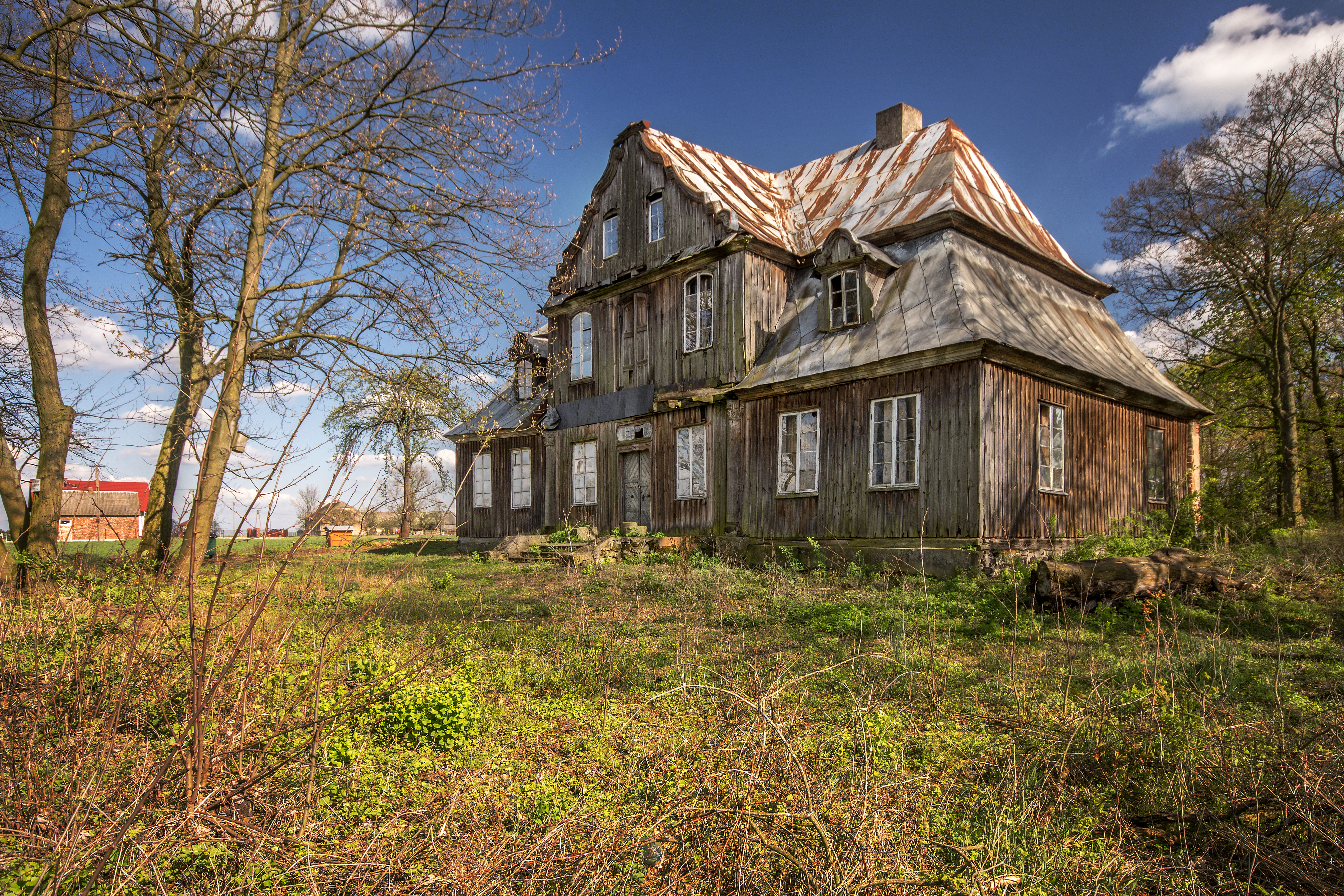 Giżyce, dwór, 1760-1775